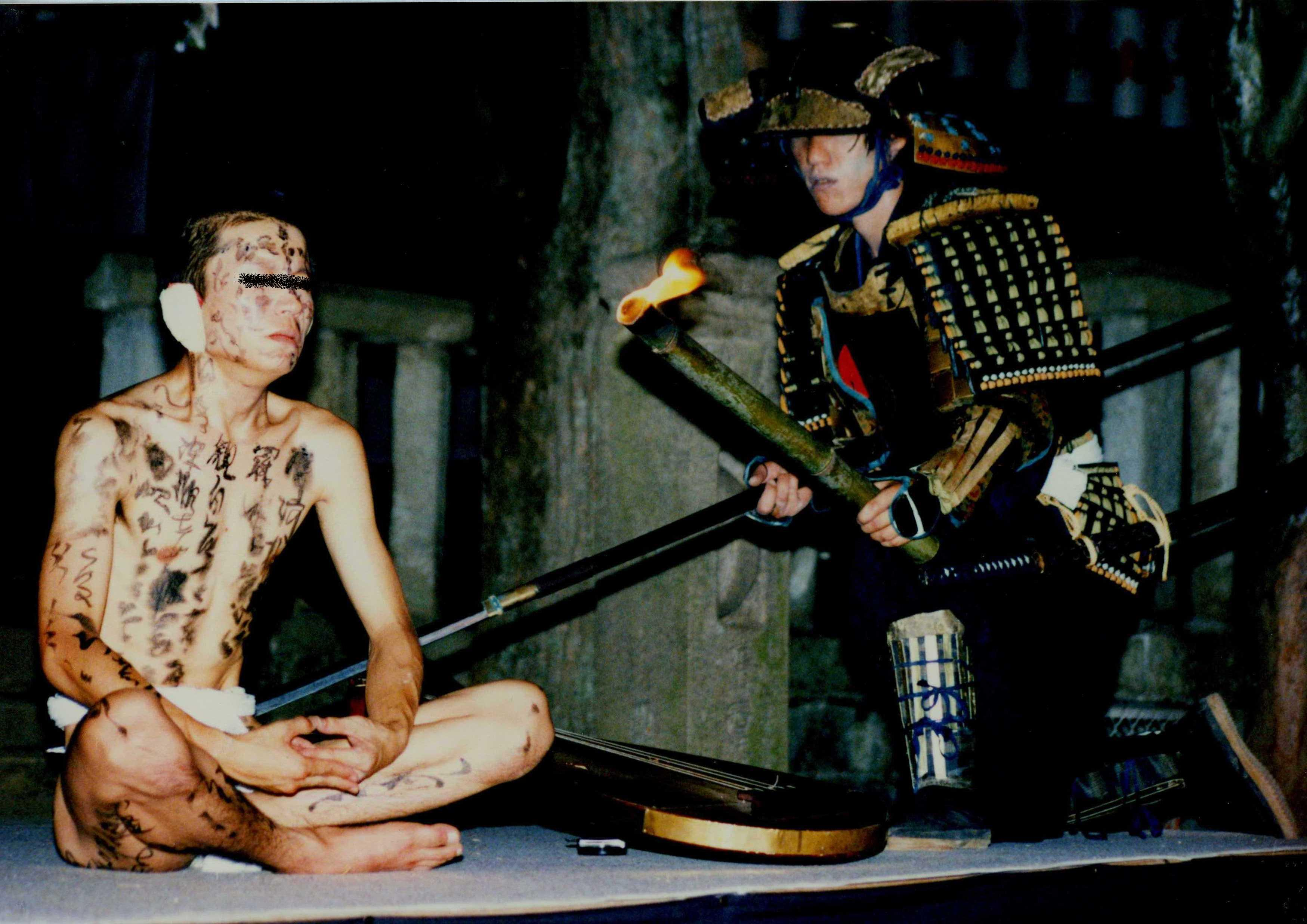 耳なし芳一（神戸市・須磨寺）